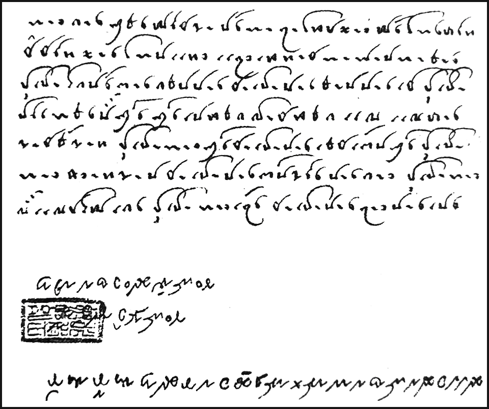 Một trang chữ Thái cổ trong gia phả họ Lò Cầm, Mai Sơn, Sơn La và chữ dấu chữ ký của người viết bằng chữ Lai Pao (Nghệ An)